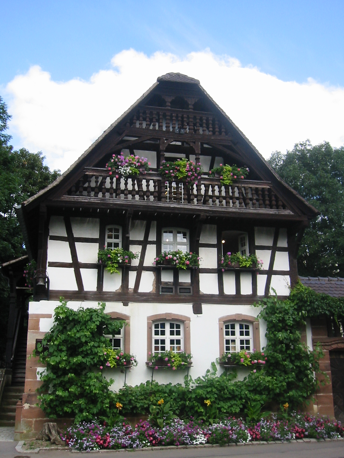 Maison Alsacienne du XVII° transférée à Nancy à l'occasion de l'exposition internationale de 1909.